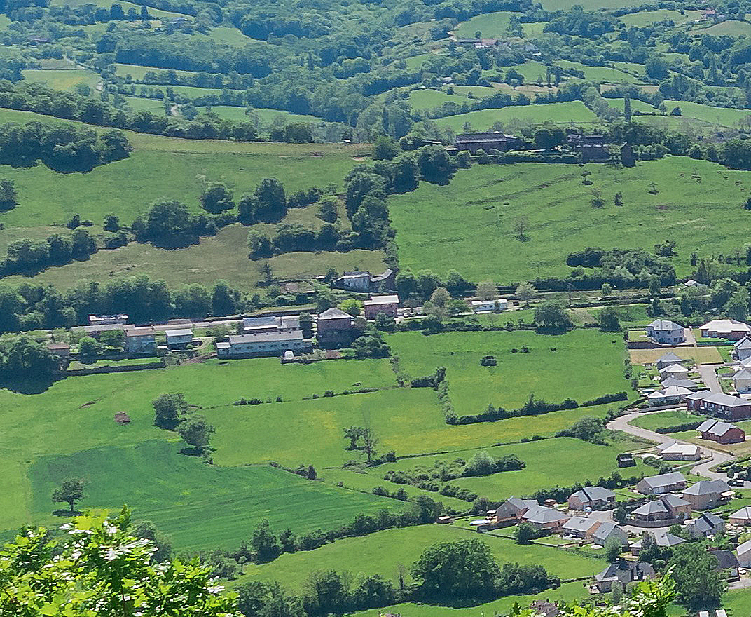 Au centre de la photo se trouve la gare de Saint-Christophe (détail de la photo : File:View on Saint-Christophe-Vallon 03.jpg).